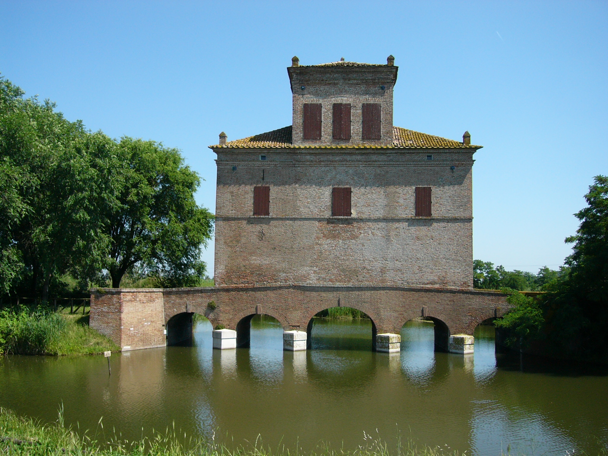 Consorzio di bonifica I Circondario Polesine di Ferrara